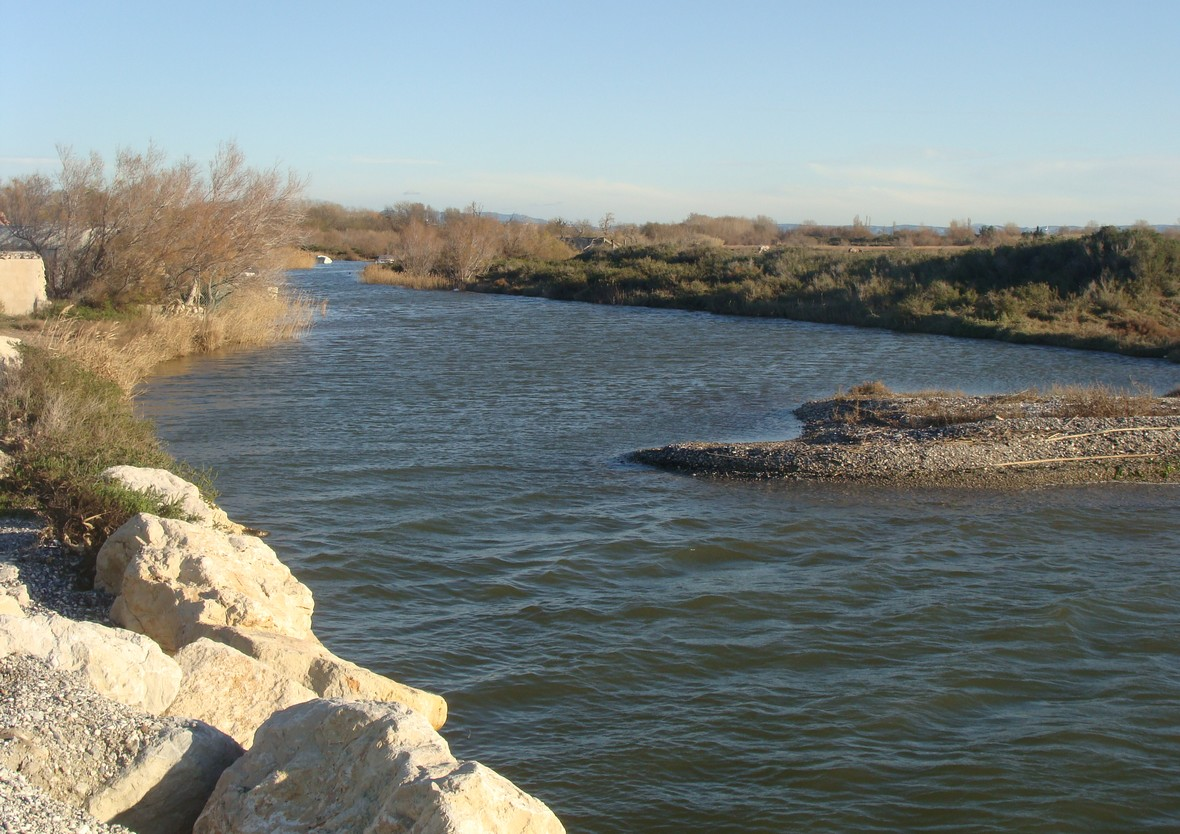 La branche nord du delta de l'Arc dans ses derniers mètres avant l'étang de Berre (vue de la rive droite en direction de l'amont).